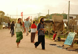 Imagen de Valizas, calle principal